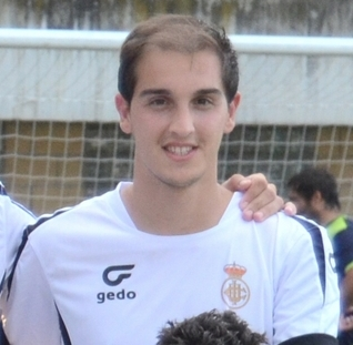 CSC_0148